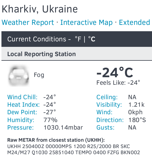 Вигляд реального коду METAR в аеропорту Харків, Основа (UKHH) на сайті станом на 25 січня 2016 року о 4:00 за часом UTC (о 6:30 за місцевим зимовим).